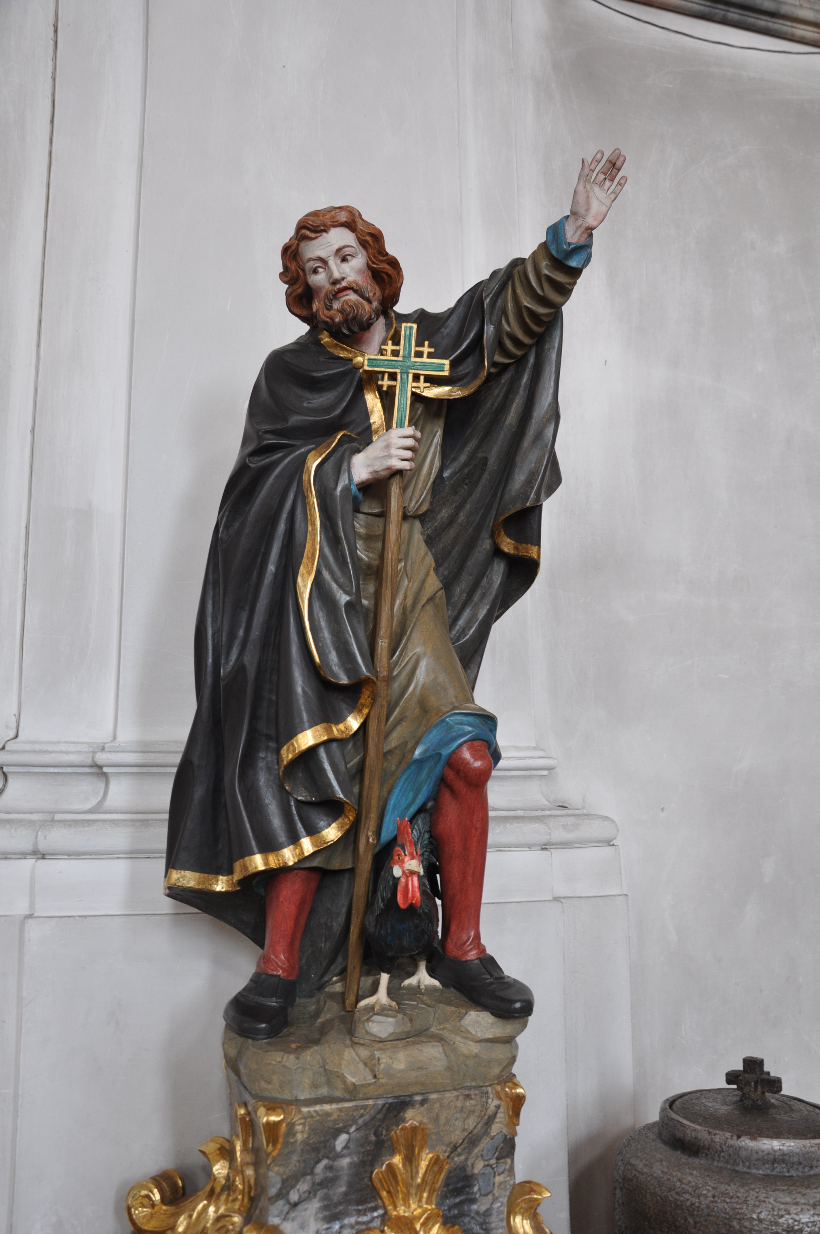 Meßkirch, Pfarrkirche St. Martin, neobarocke Figur "Hl. Heimerad" (20. Jh.?)